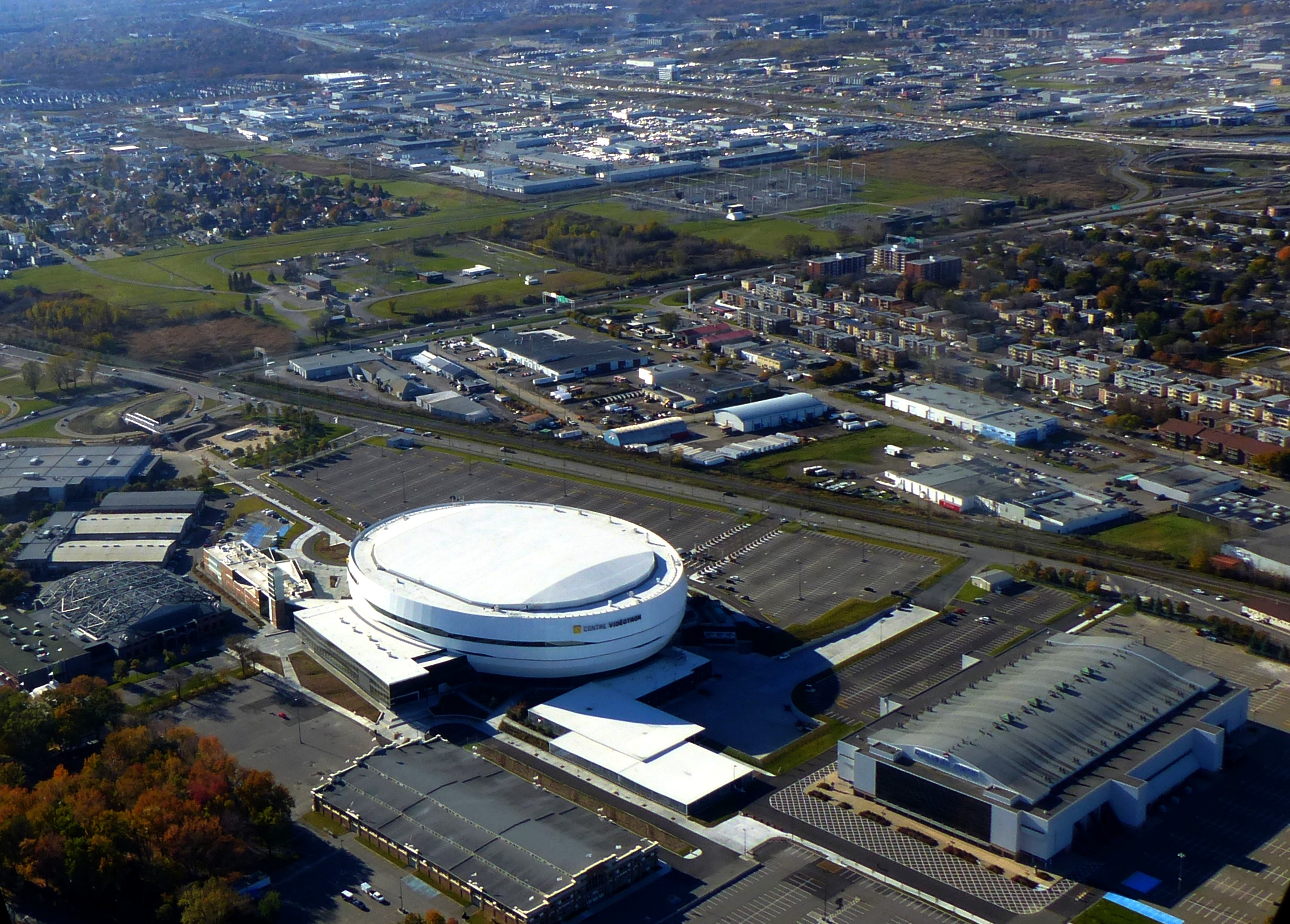 Québec City – ExpoCité - Centre Vidéotron